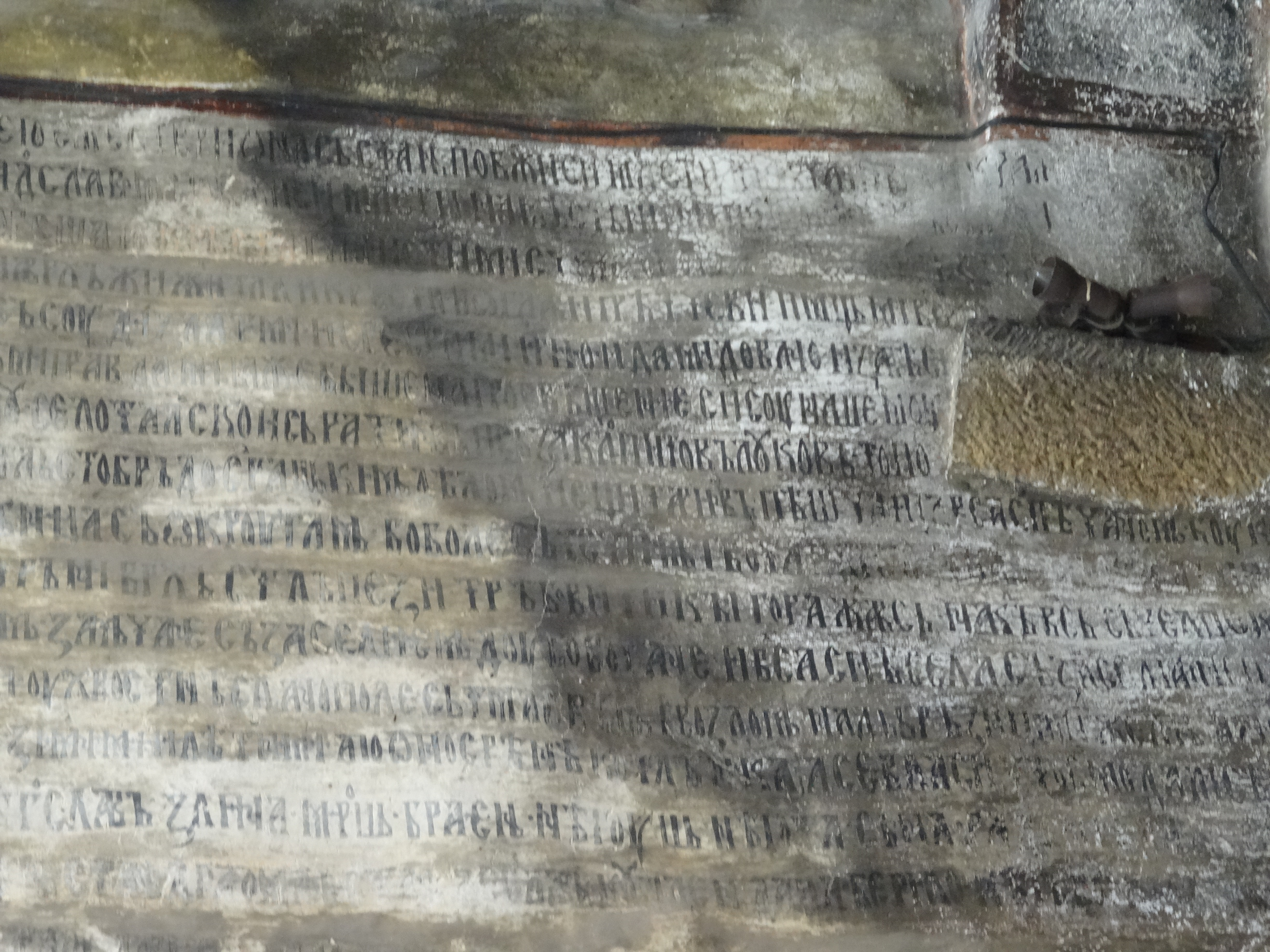 Жича је српски средњовековни манастир из прве половине 13. века, који се налази у близини Краљева. Подигао ју је први краљ Србије, Стефан Немањић.